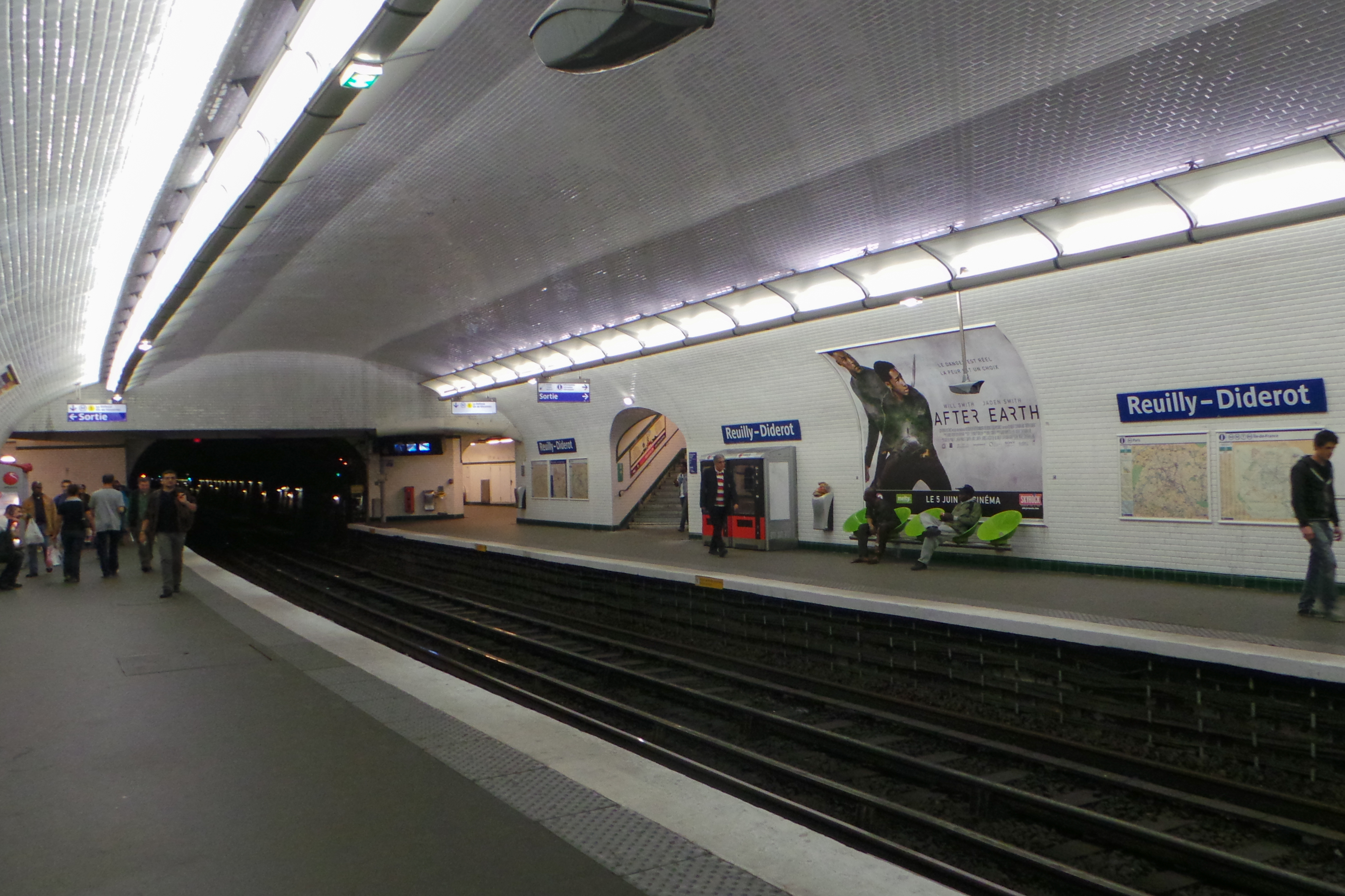 Station de métro Reuilly - Diderot, ligne 8 du métro de Paris - Paris, France